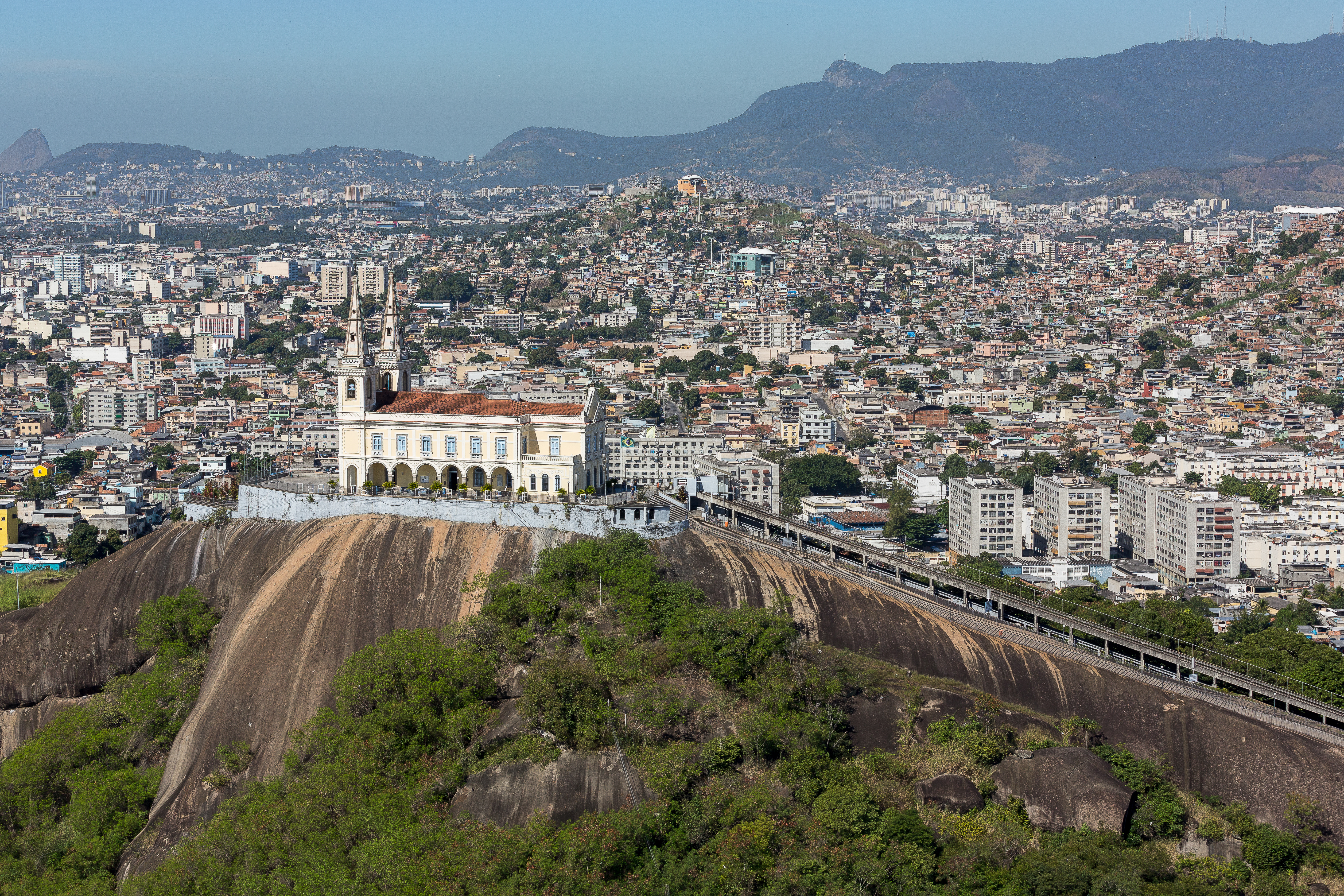 Imagem aérea da Igreja da Penha